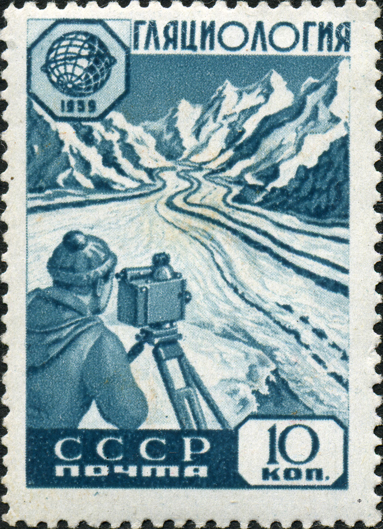 Марка СССР